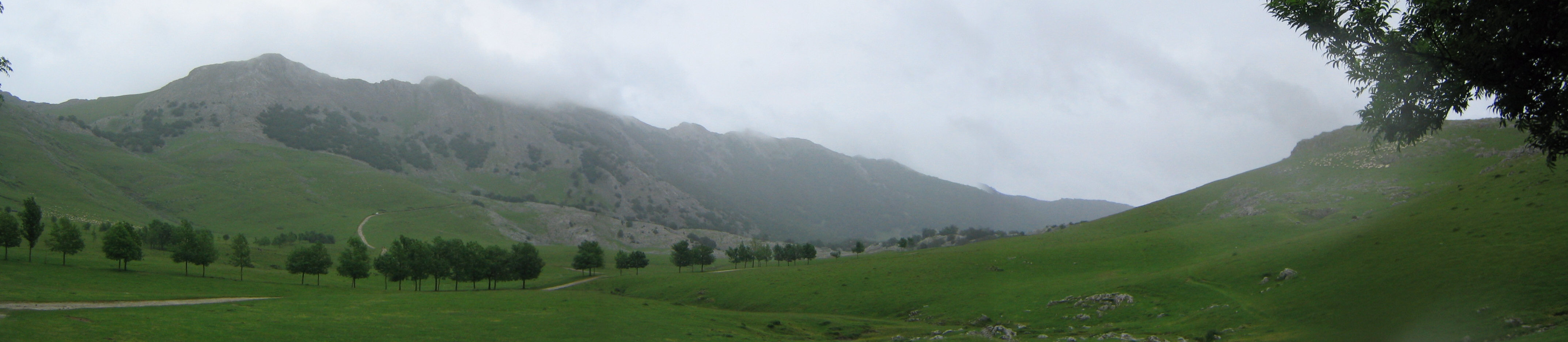 Macizo de Aitzkorri desde Urbia / Aitzkorriko mendilerroa Urbiatik